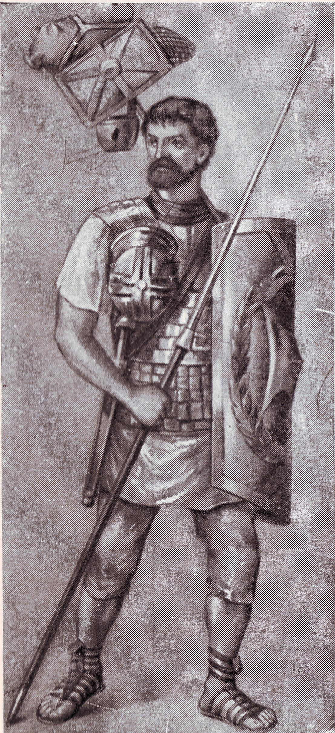 Римский легионер в походе. Легионер в полном вооружении; шлем висит на особом крючке, приделанном к панцирю. На палке (furca) легионер несет багаж, состоящий из сундучка, сетки для провианта, горшка с ложкой и меха для воды.